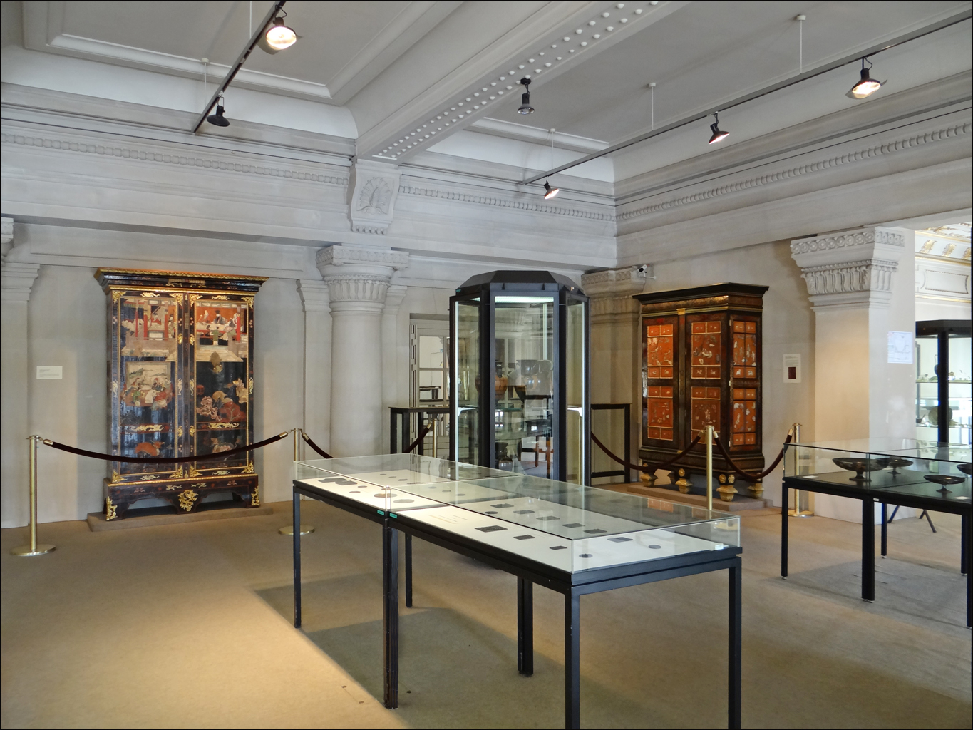 Une des salles du musée du Département des Monnaies, médailles et antiques Bibliothèque nationale de France Le département comprend : - 520 000 monnaies et médailles, - 35 000 objets non monétaires (camées, intailles, vases grecs, ivoires antiques ou médiévaux, bronzes, sculptures, inscriptions, …) - une documentation autour de ses collections (80 000 ouvrages de numismatique, sigillographie, glyptique, mais aussi d’épigraphie, archéologie, histoire ancienne et médiévale, et histoire des collections et des collectionneurs).